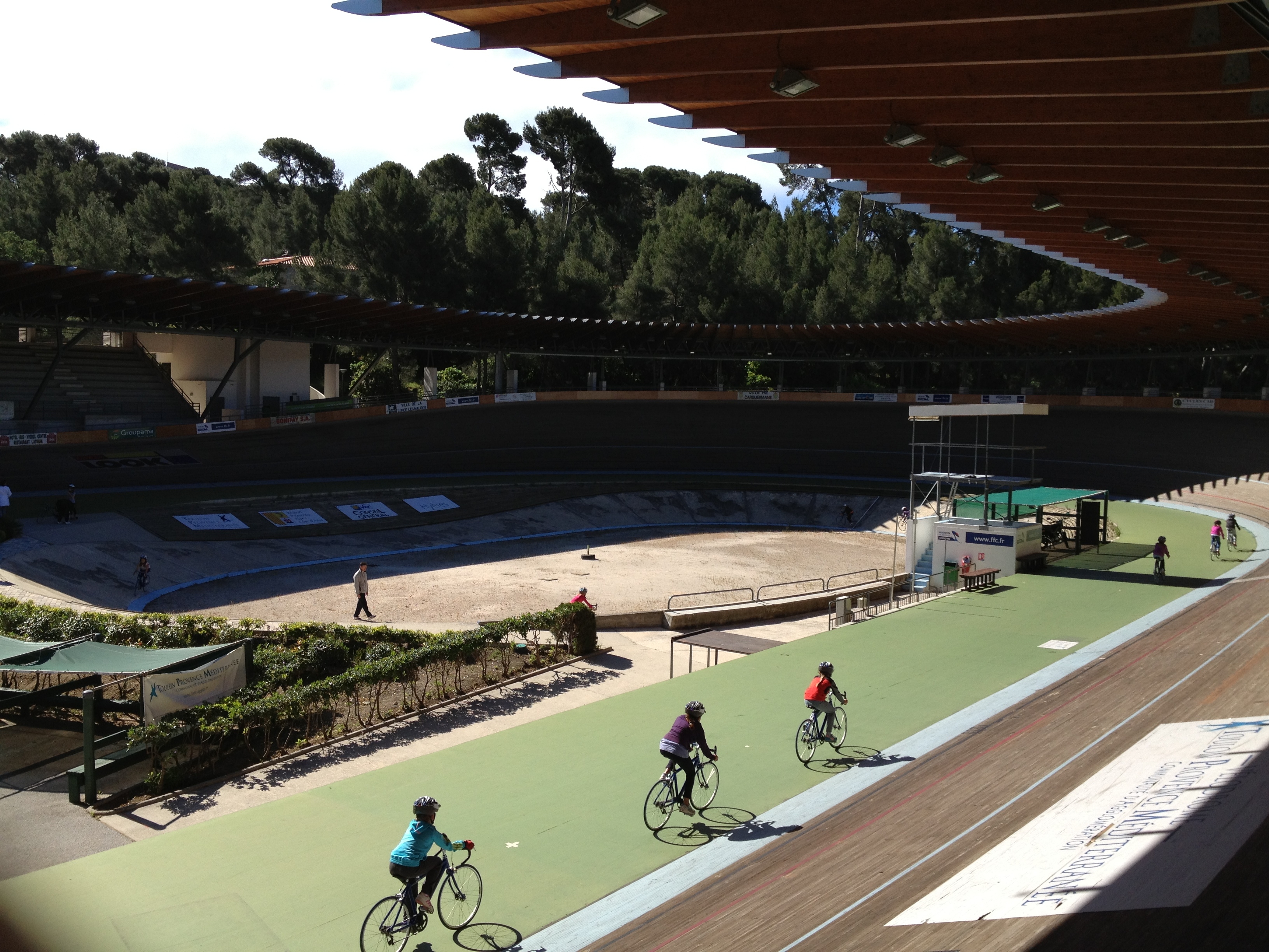 Radrennbahn in Hyeres, Frankreich